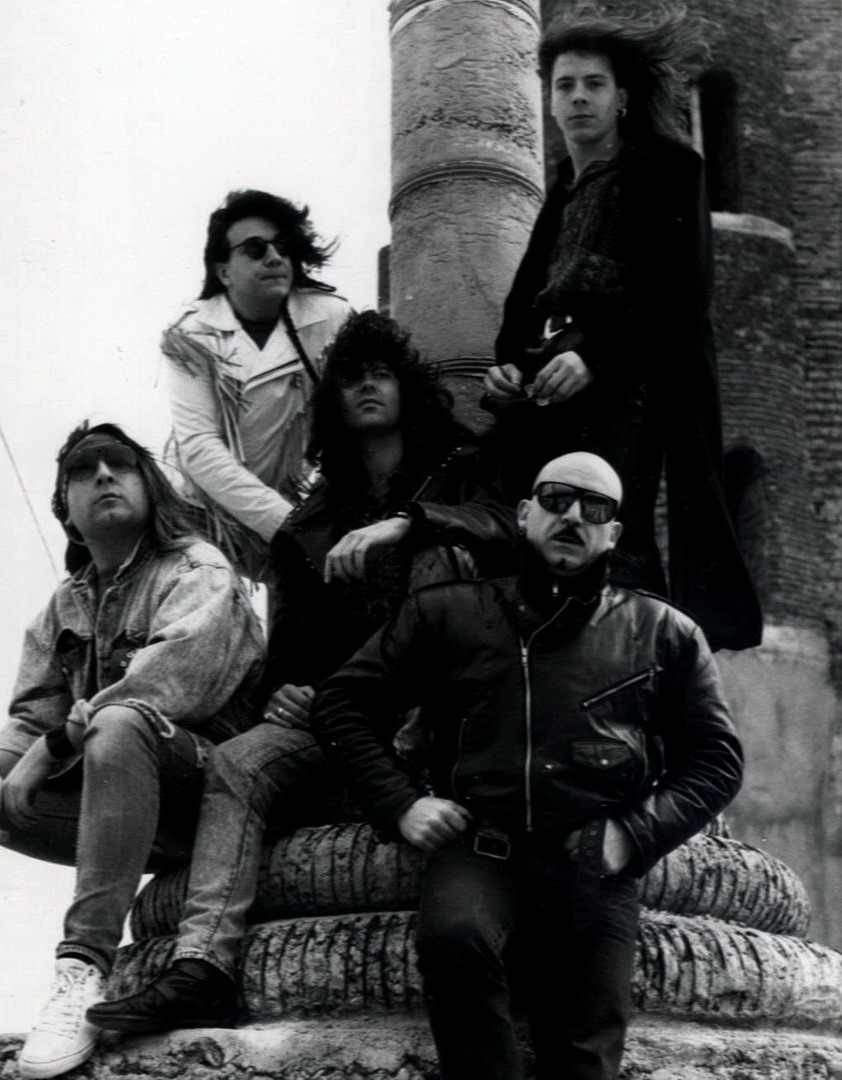 Angeles del Infierno 4ªFormación Robert Alvarez , Javier Carlucho , Santi Rubio , Guillermo Pascual , Juan Gallardo